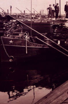 Historisches Foto eines Bootes